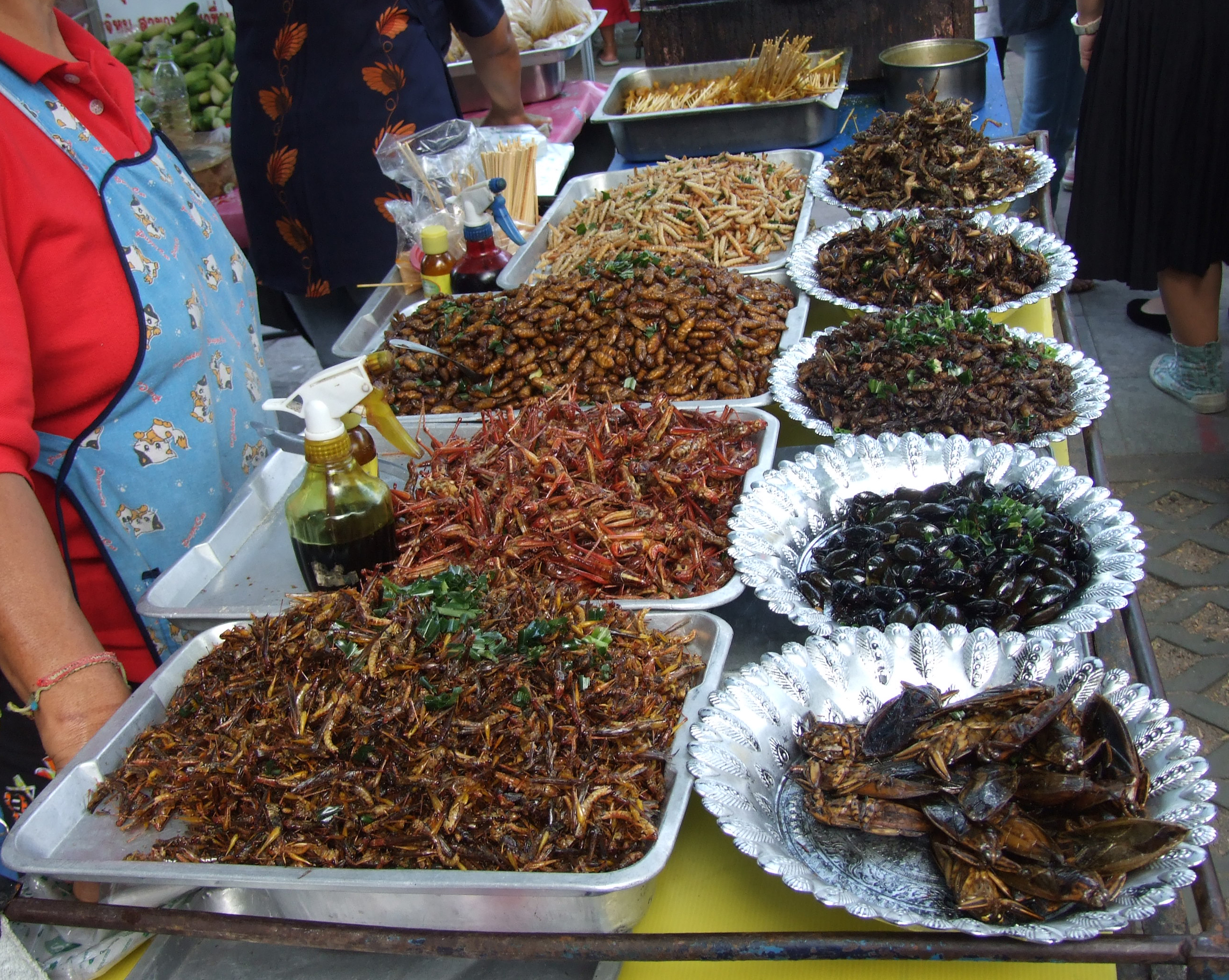 Marktstand mit Insekten in Thailand Entomophagie beim Menschen